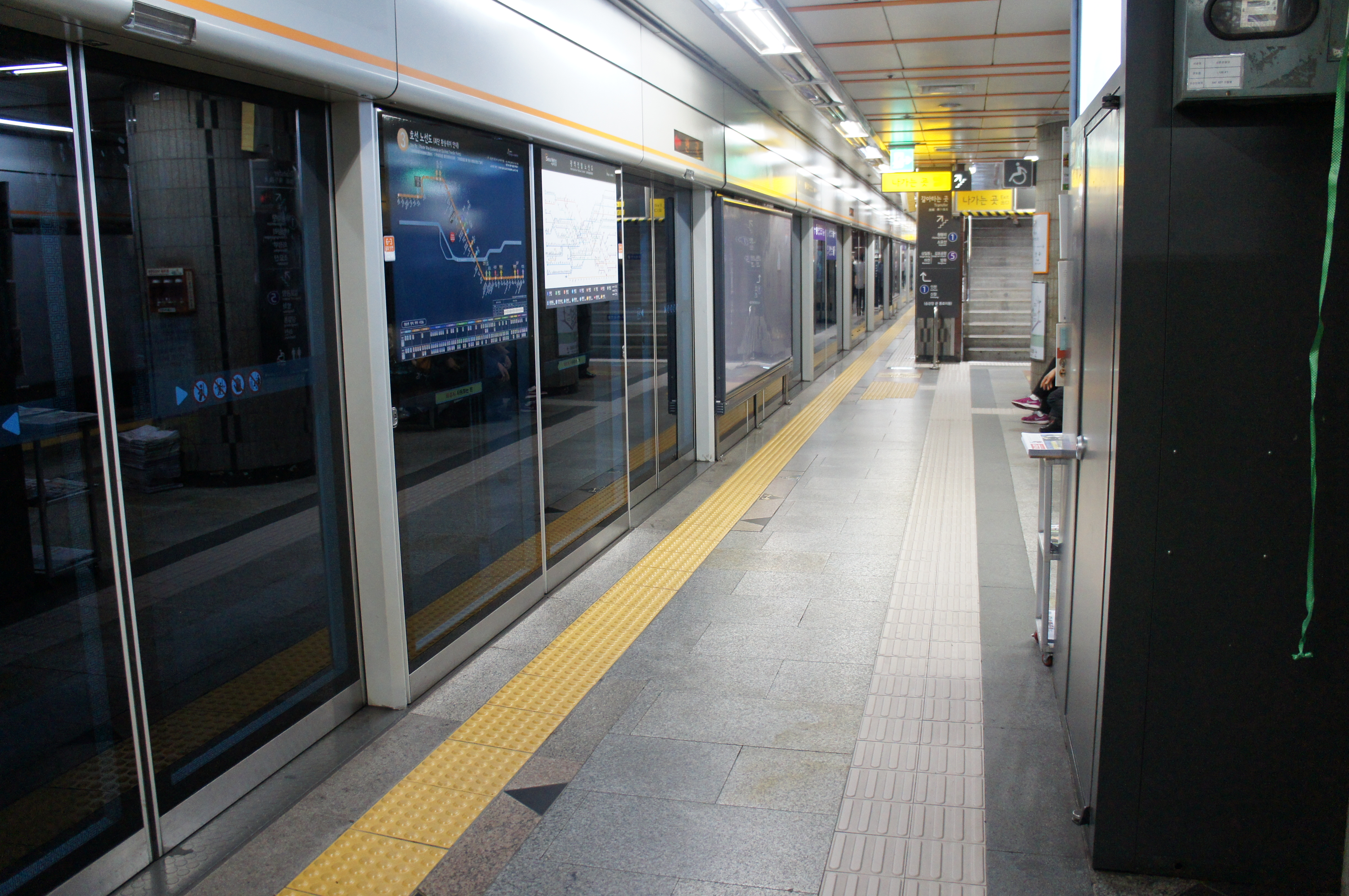 3호선 종로3가역 승강장